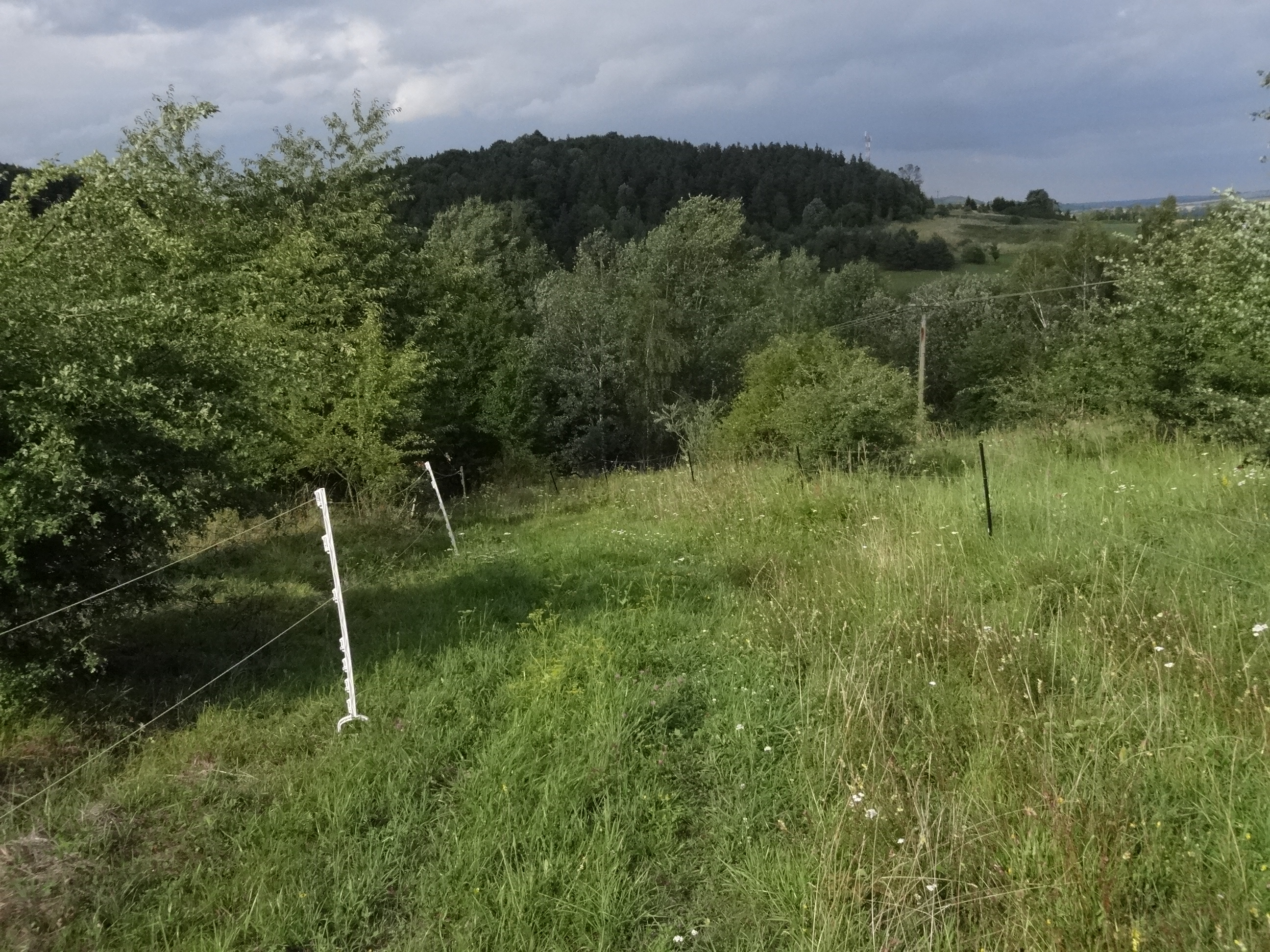 PP Cvičák (severně od Českého Krumlova)